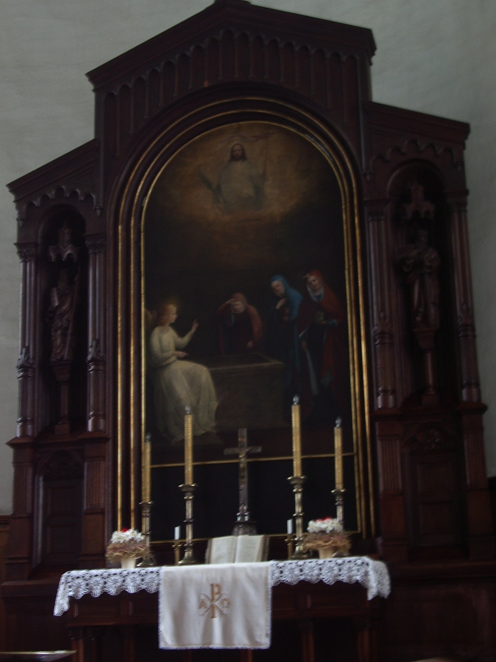 Põltsamaa Niguliste kiriku altarimaal "Naised haua juures". Foto: Ave Maria Mõistlik, mai 2006.